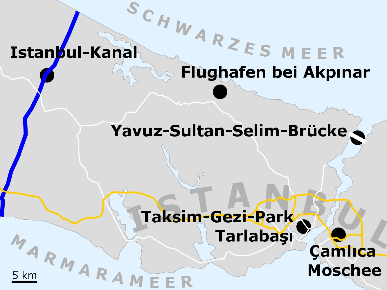 Umstrittene Großbauprojekte im Istanbuler Raum im Jahr 2013